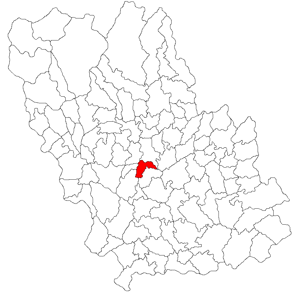 Categorie:Hărţi ale judeţului Prahova